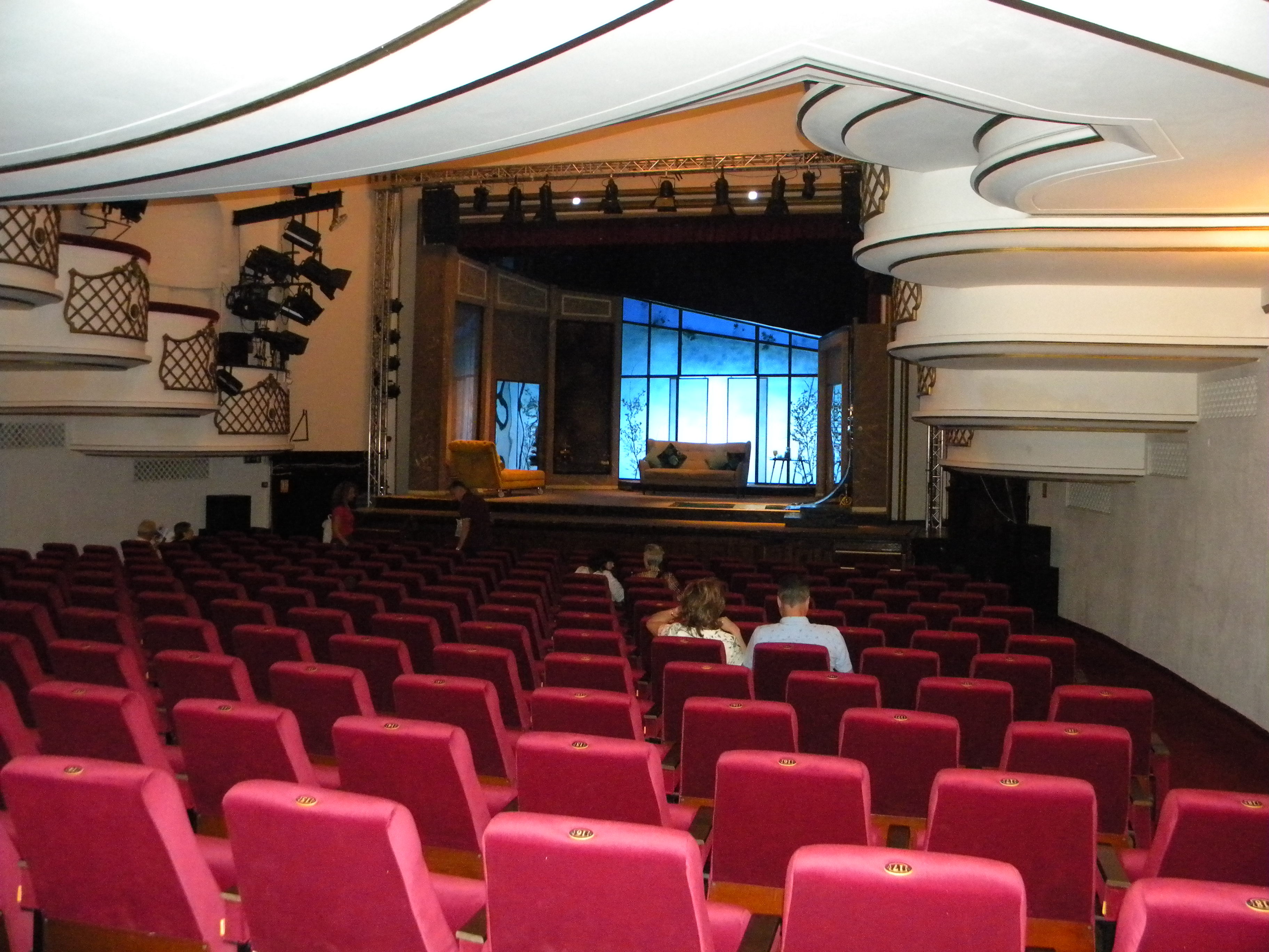 Bucuresti, Romania. Teatrul NOTTARA. Sala de spectacole si scena inainte de inceperea. spectacolului